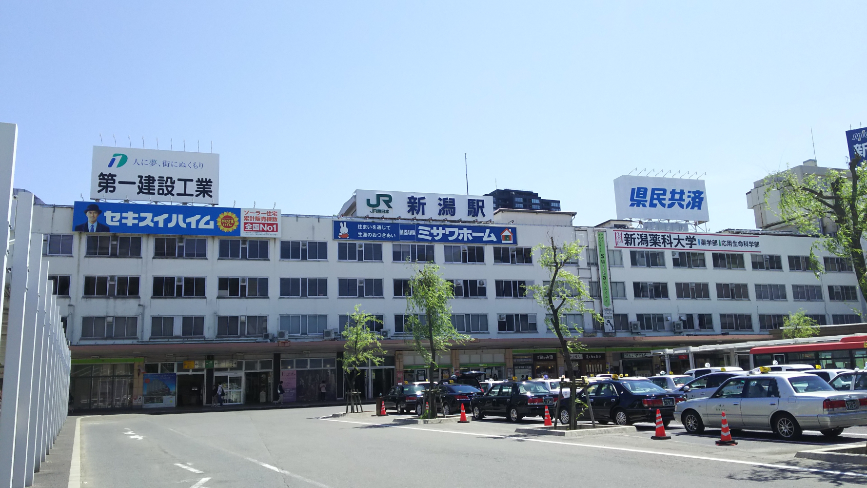 新潟駅万代口駅舎201805